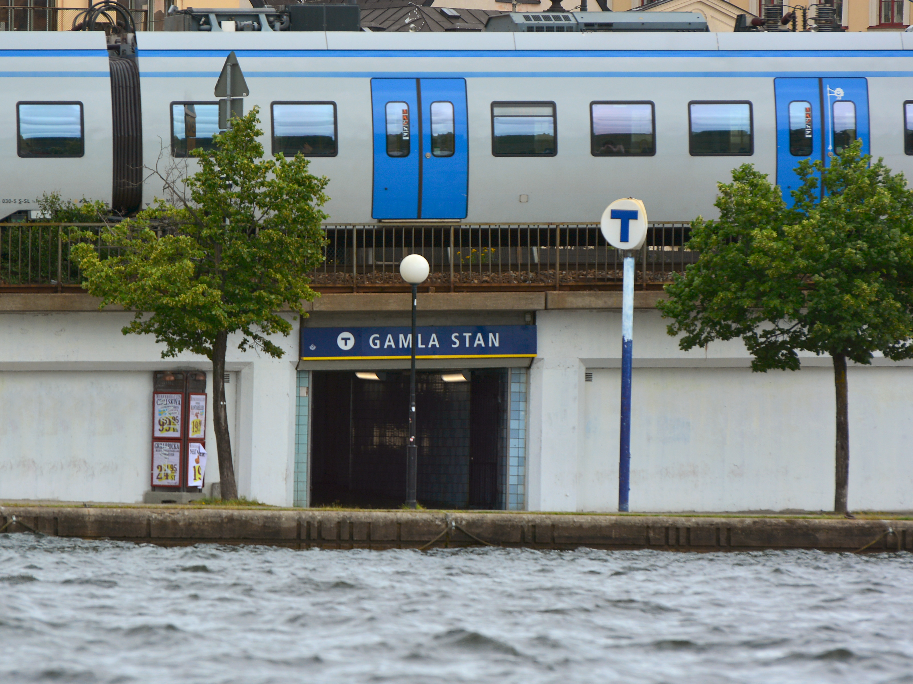 Nedgången till Gamla stans tunnelbanestation från Munkbrohamnen